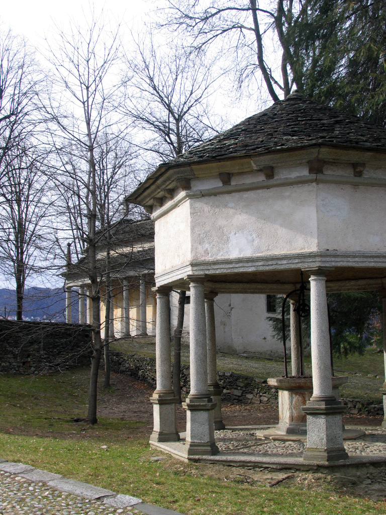 Sacro Monte Calvario di Domodossola 03/2009